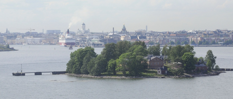 Lonnan saari Helsingin edustalla